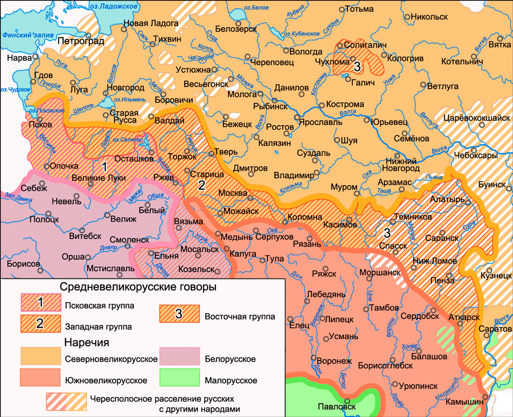 Фрагмент диалектологической карты русского языка 1914 года — территория средневеликорусских говоров. На основе: Диалектологическая карта 1914 года (Дурново Н.Н., Соколов Н.Н., Ушаков Д. Н. Опыт диалектологической карты русского языка в Европе. — М., 1915)